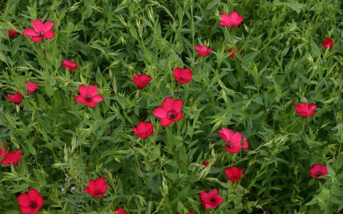 Linum grandiflorum: Habit.